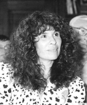 Berlin, Verleihung eines Literatur-Stipendiums ADN-ZB Uhlemann 19.5.89 Berlin: Seghers-Stipendium - Das Anna-Seghers-Stipendium der Akademie der Künste wurde der nikaraguanischen Autorin Gioconda Belli (r.) und Ramon Diaz Eterovic (l.) aus Chile überreicht. Siehe ADN-Meldung vom 19.5.1989